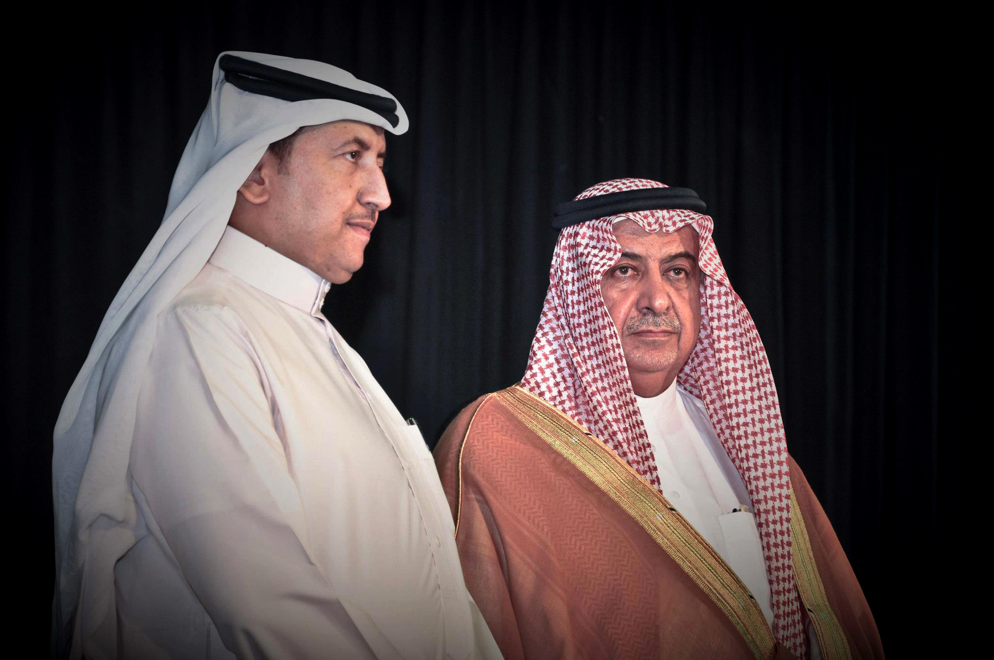 صورة للفنان فيصل الخديدي مع محافظ الطائف فهد بن معمر